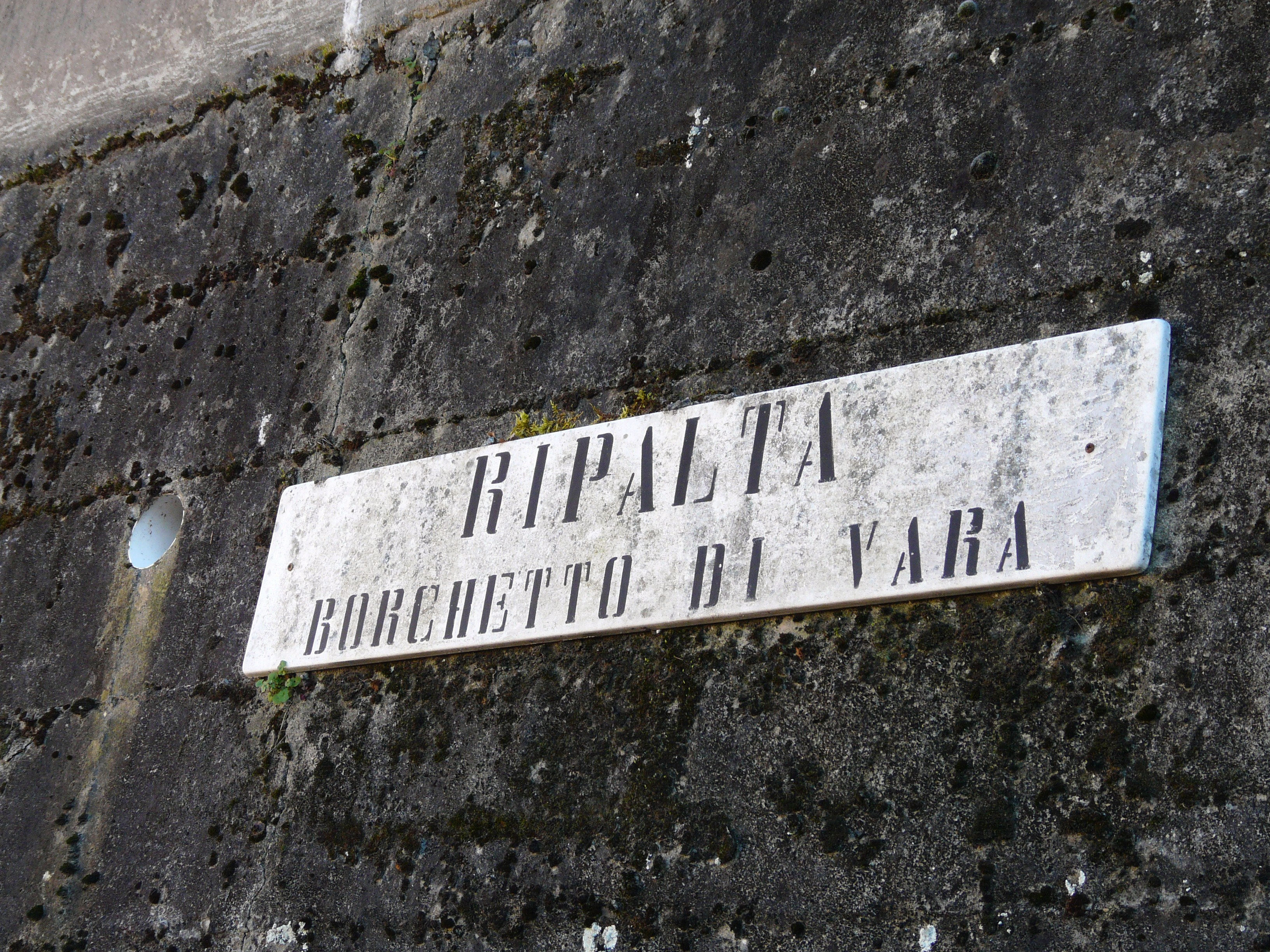 Indicazione toponomastica di Ripalta, Borghetto di Vara, Liguria, Italia